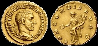 Ауреус, 251-253 рр., золото (3,11 г.). Аверс - Требоніан Галл, IMP CAE C VIB TREB GALLVS AVG, реверс – Конкордія (втілення згоди громадян держави), CONCORDIA AVG.